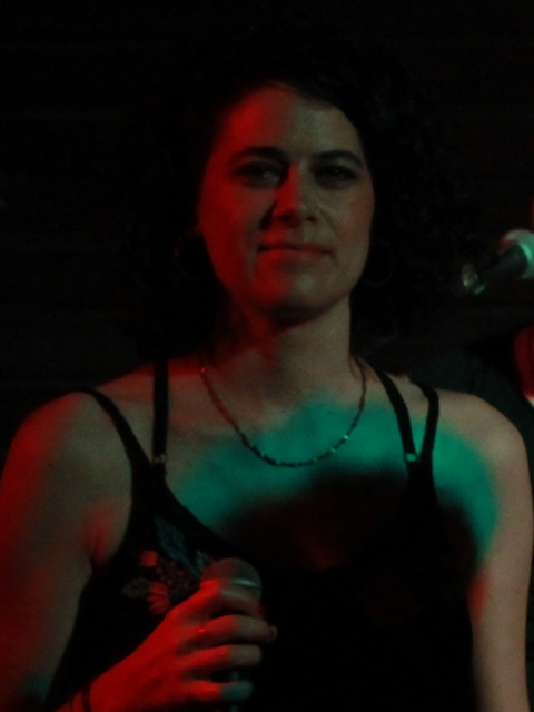 Melis Danişmend, Ufuk Beydemir konserinden.